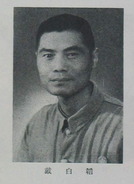 中文（台灣）: 中國人民政治協商會議第一屆全體會議代表